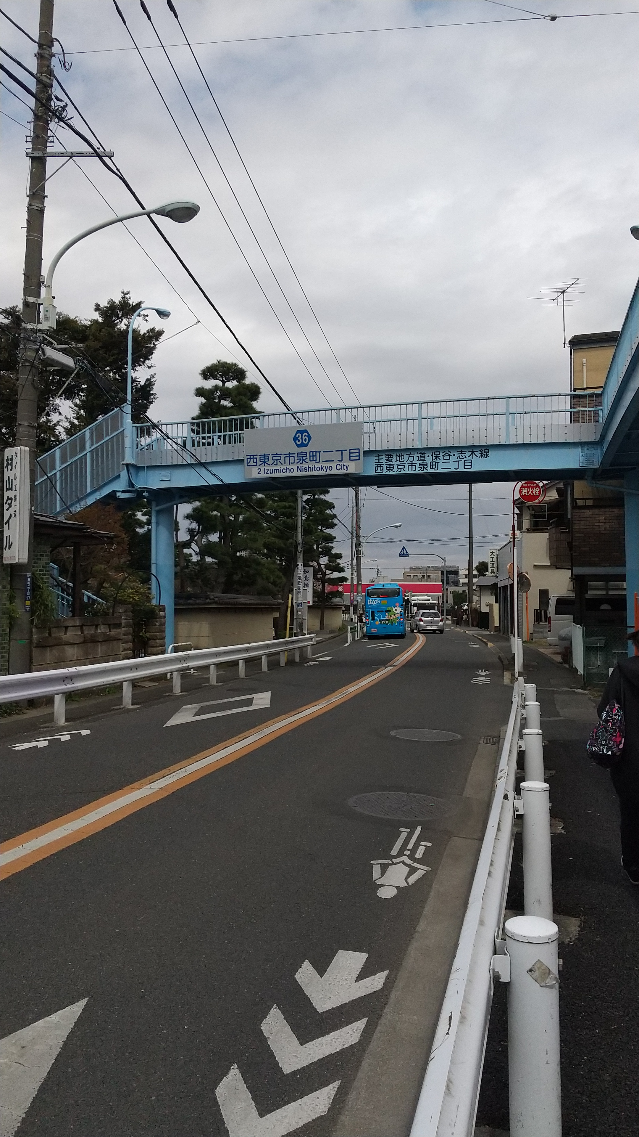 西東京市、泉町にて